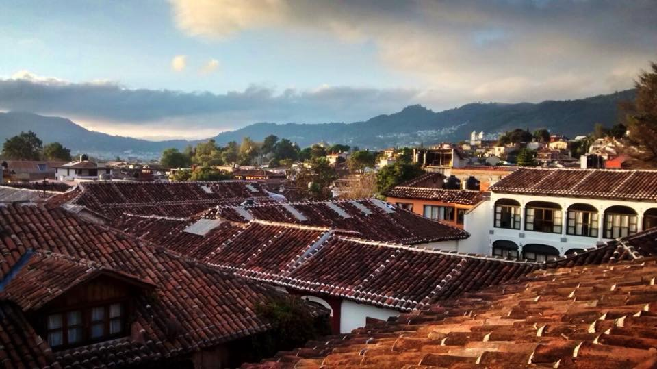 Vista del pueblo